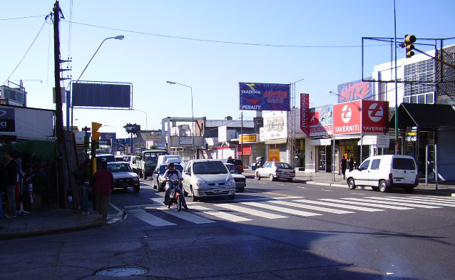 Avenida Mitre, Munro, Argentina